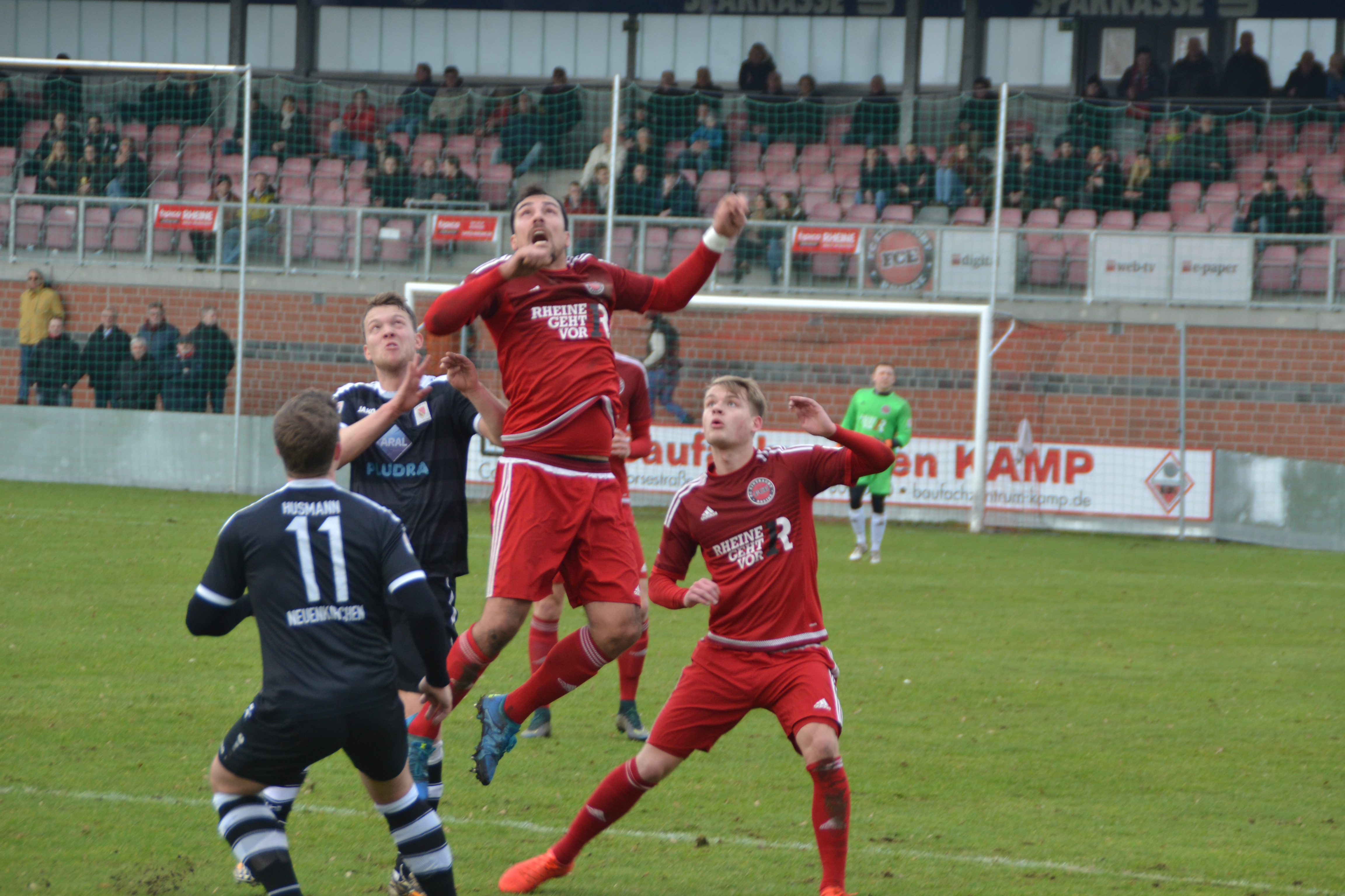 Die Tribüne der Obi-Arena während des Spiel FC Eintracht Rheine gegen den SuS Neuenkirchen.